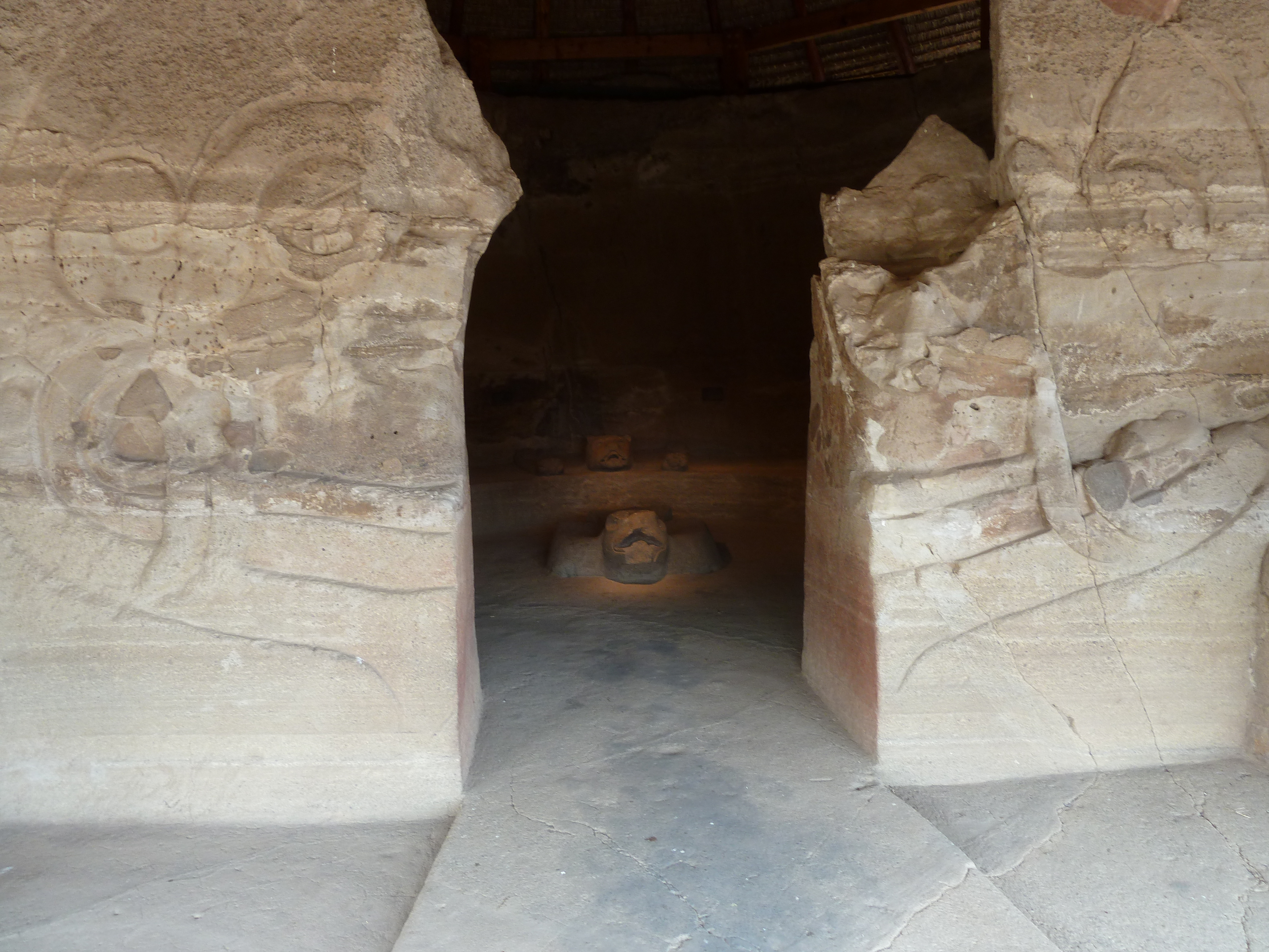 Zona arqueológica de Cuauhtinchán, templo Cuauhcalli ('Casa del sol' o 'Casa de las águilas'), interior